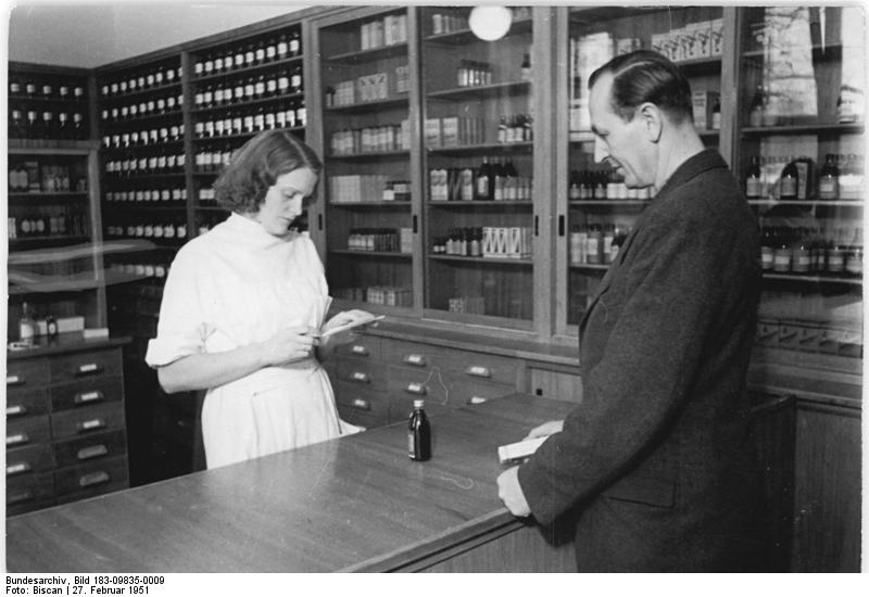 Magdeburg, Apotheke der Poliklinik, Innenansicht Aus der Arbeit der Pawlow-Poliklinik in Magdeburg. Die kürzlich in Magdeburg eröffnete Pawlow-Poliklinik führt in modern eingerichteten Räumen Behandlungen sämtlicher Krankheiten durch. Die Ärzte und das Pflegepersonal der Klinik bemühen sich in vorbildlicher Weise um die werktätige Bevölkerung und zeichnen sich durch kollektive Zusammenarbeit besonders aus. Wie in anderen Betrieben der Aktivistenplan den Arbeitsprozeß entscheidend beeinflußt, erfolgt die Behandlung der Patienten in der Pawlow-Poliklinik ebenfalls nach einem bestimmten Plan und hat bisher gute Erfolge gezeitigt. Neuartig ist weiterhin, daß das Ärztekollektiv jeden einzelnen Krankheitsfall genauestens bespricht und ebenfalls die Behandlungsweise festlegt. In schwierigen Fällen wird die Diagnose sogar von allen Ärzten der Klinik gemeinsam gestellt. UBz: In der Apotheke der Poliklinik erhält der Patient die ihm verordneten Arzneien. Illus Biscan 27.2.51 Ko-Be.